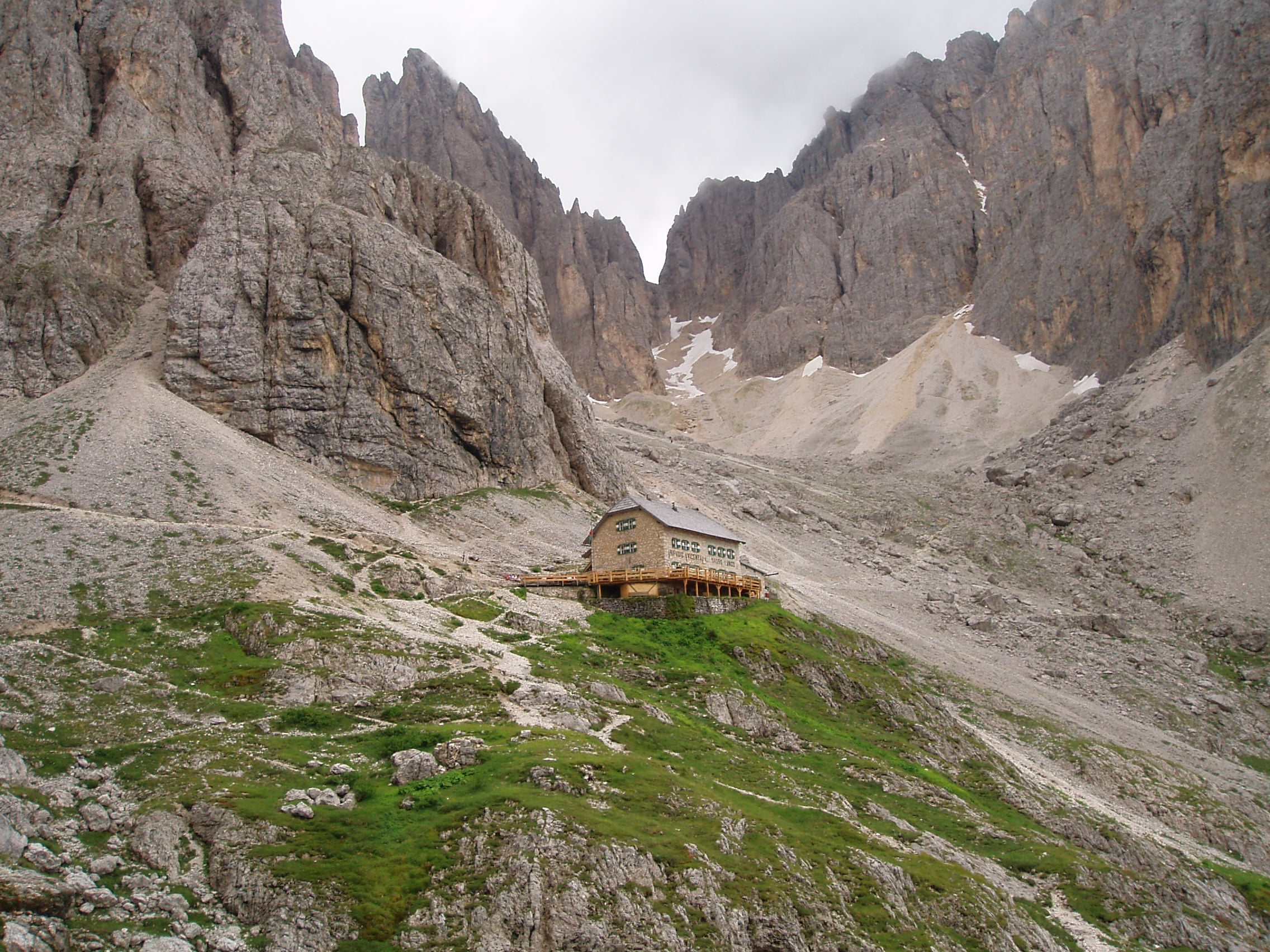 Enrico, privata